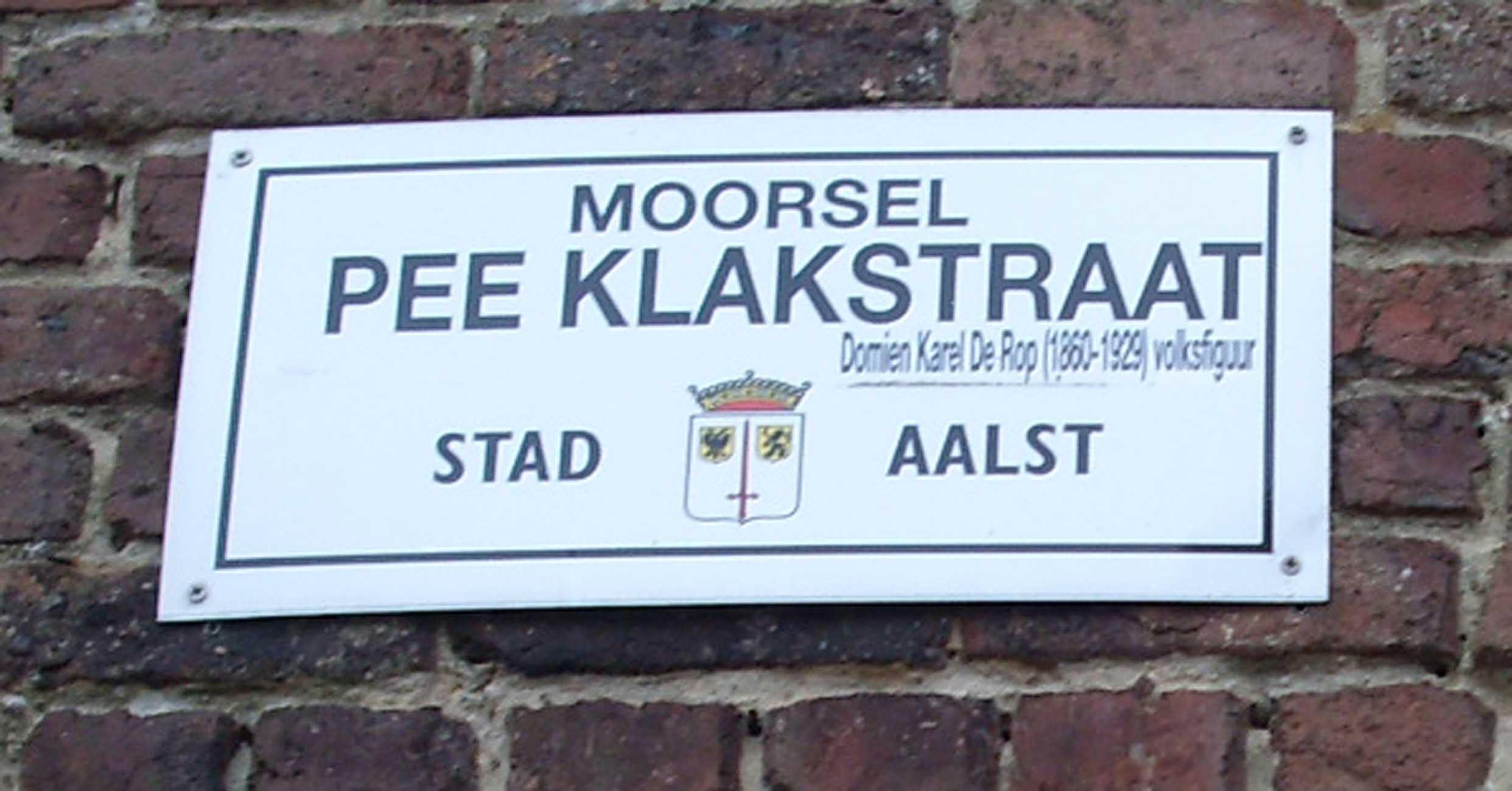 Pee Klakstraat - Moorsel - Aalst - Oost-Vlaanderen - Vlaanderen - België